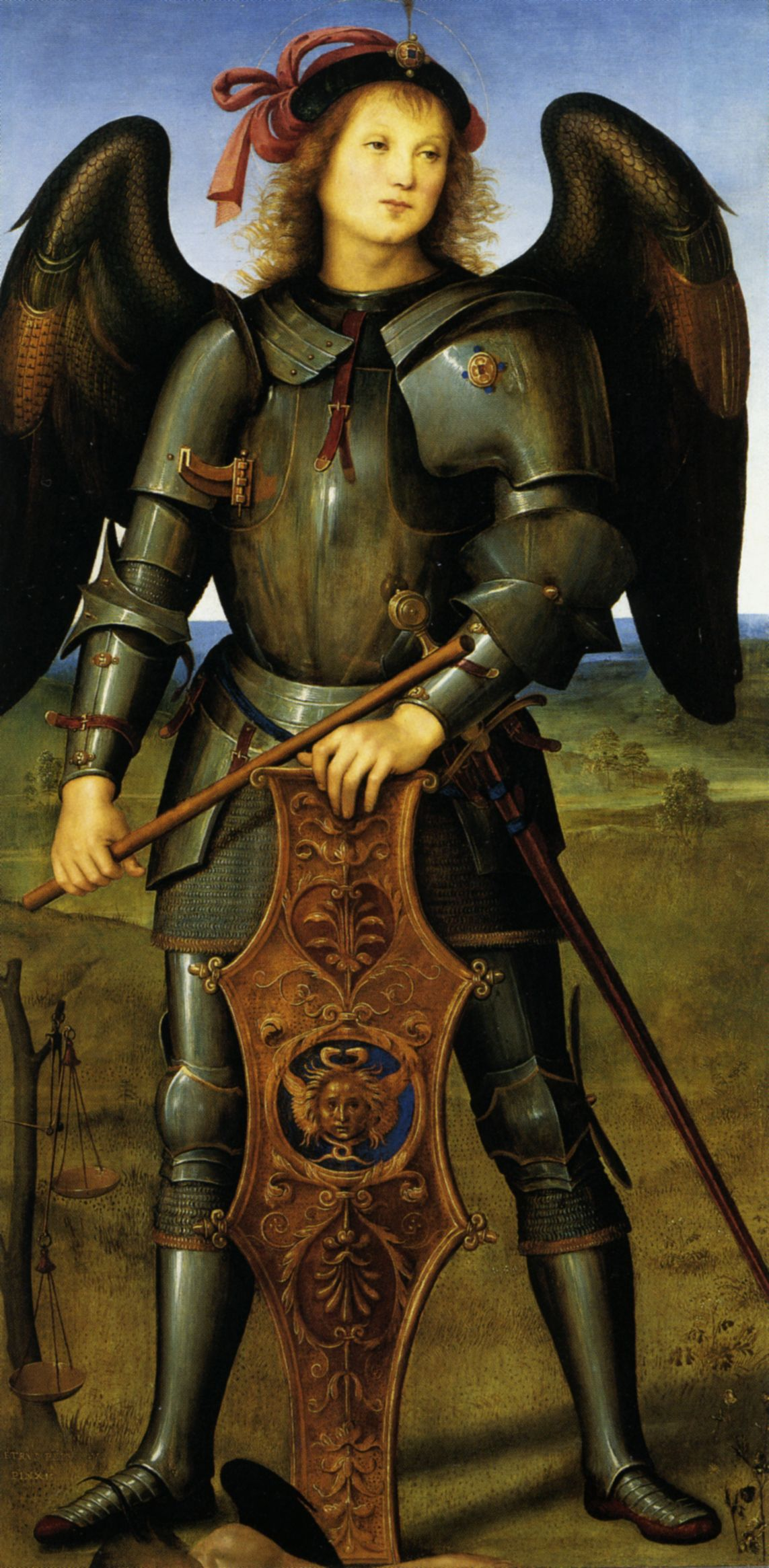 Polittico della Certosa di Pavia (Arcangelo Michele) Cat. no. 54 in Vittoria Garibaldi: Perugino. Catalogo completo. Octavo, Firenze 2000, ISBN 88-8030-091-1